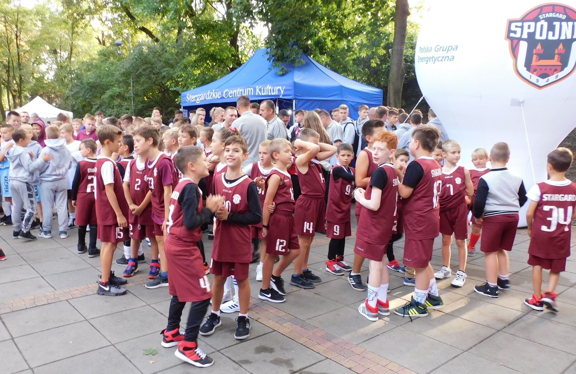 Stargard. Gala na 70-lecie Spójni Stargard